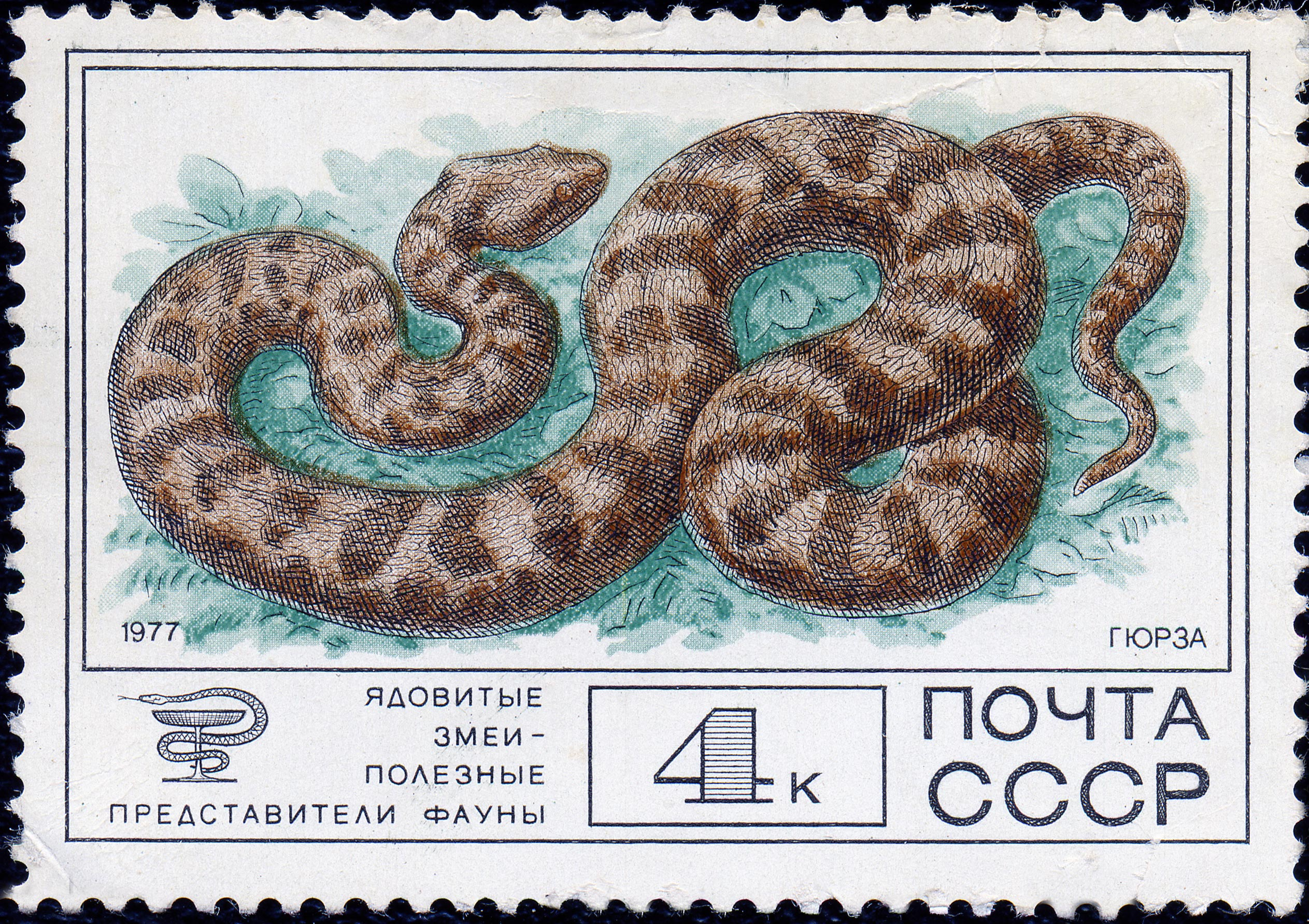 Почтовая марка СССР. 1977. Гюрза